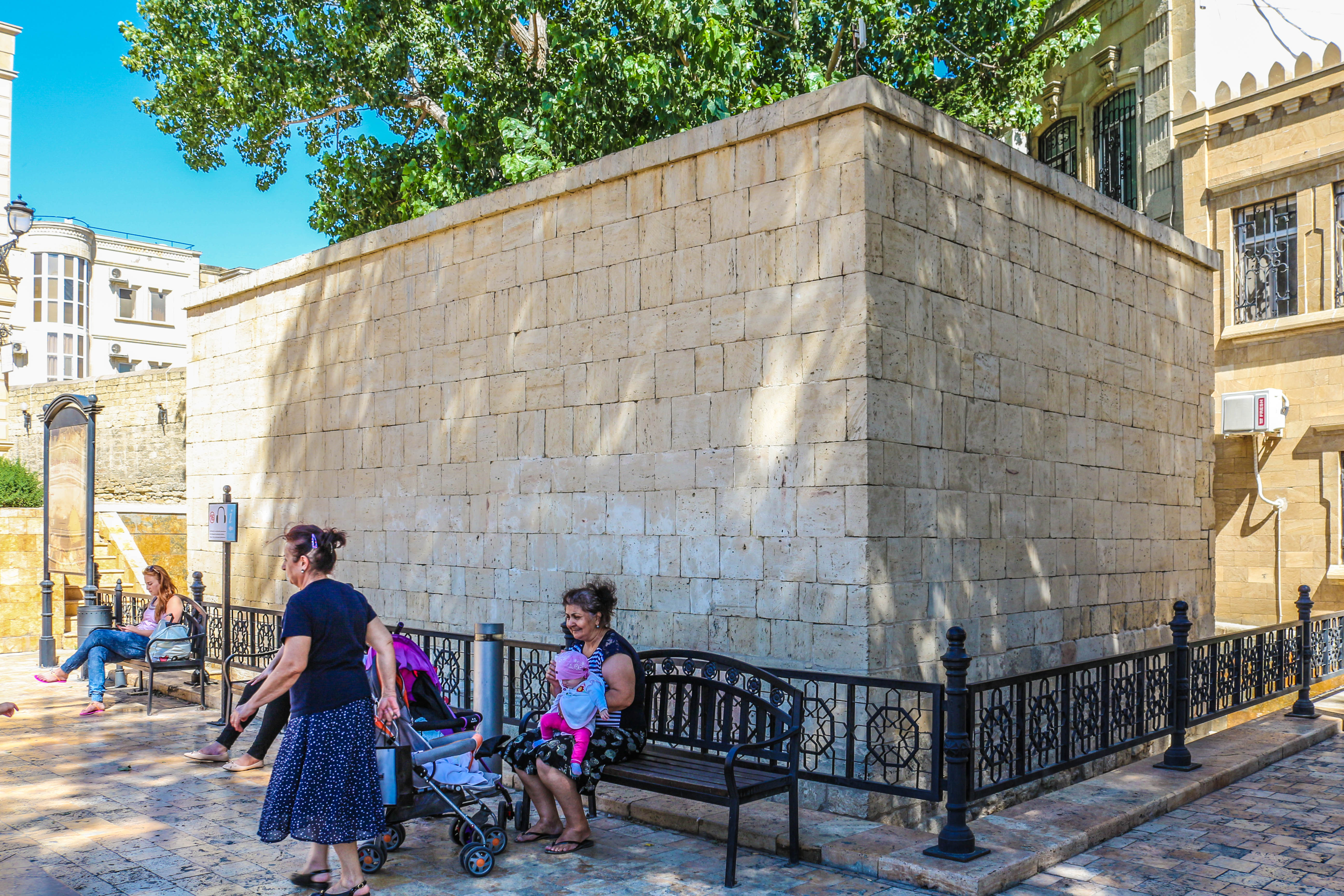 Qazi Fəzlullah bin Osman Məscidi